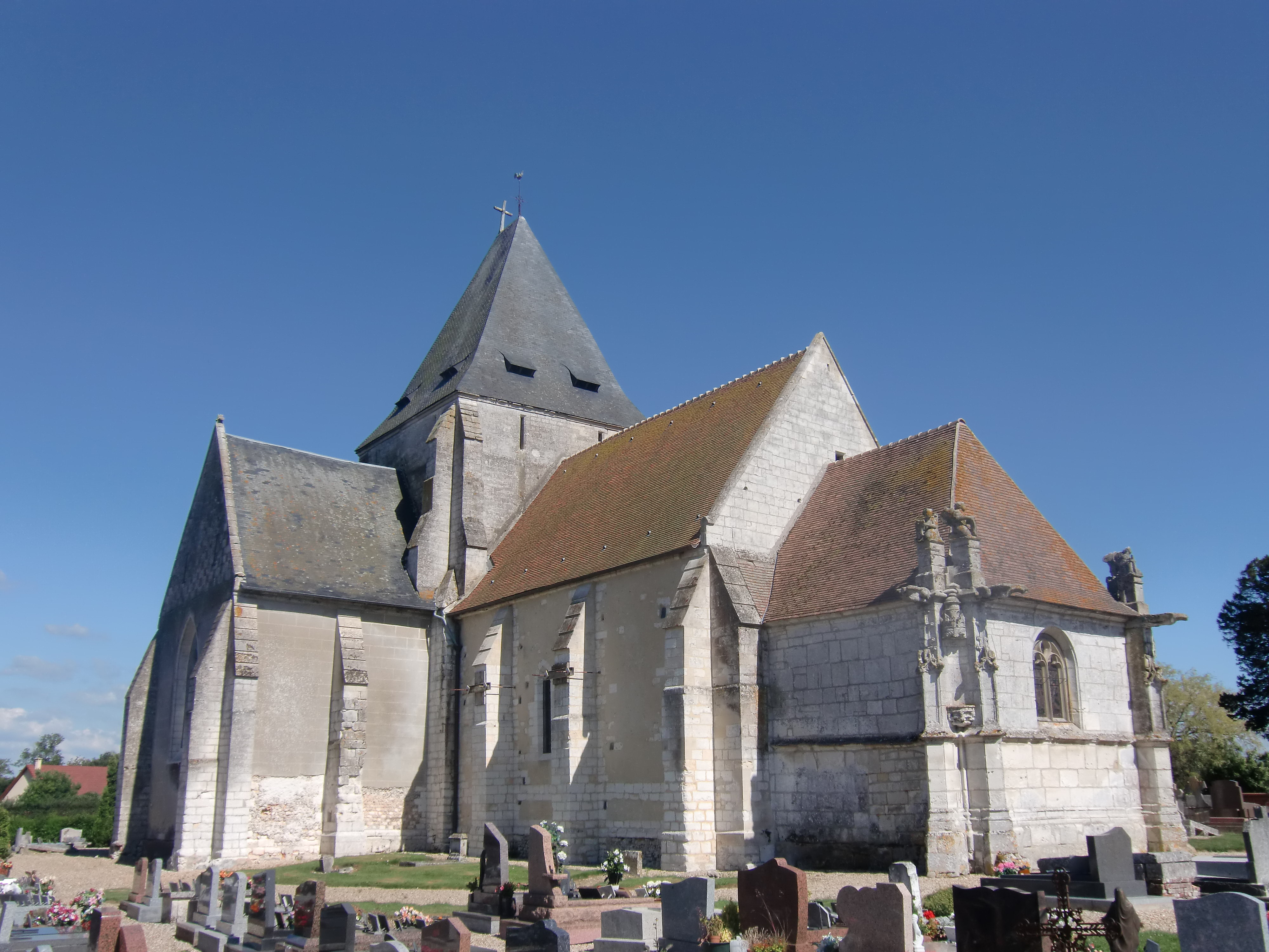 Eglise d'Illeville-sur-Montfort (Eure, Normandie, France)